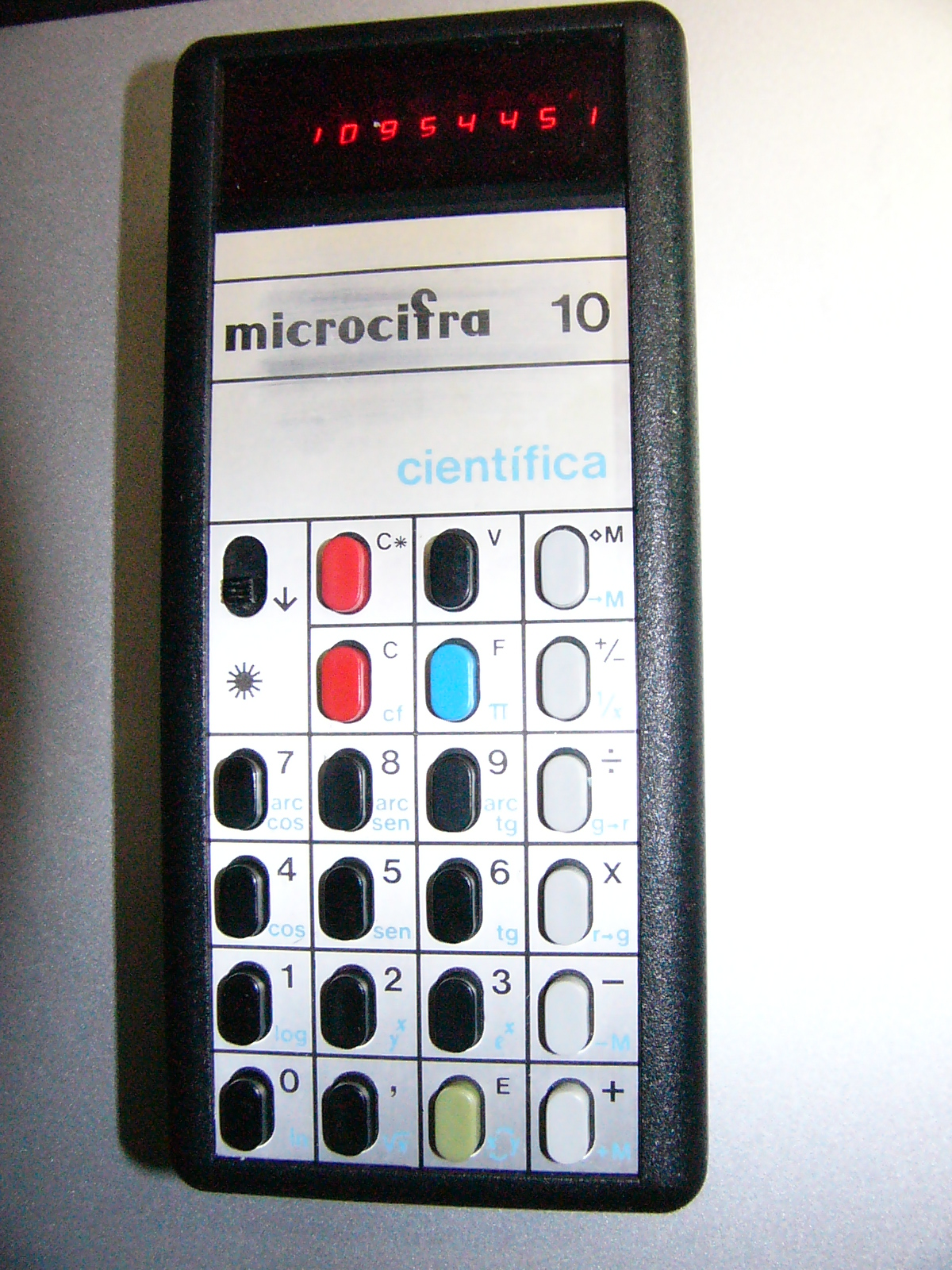 Fate社製 RPN関数電卓 microcifra 10 cientifica